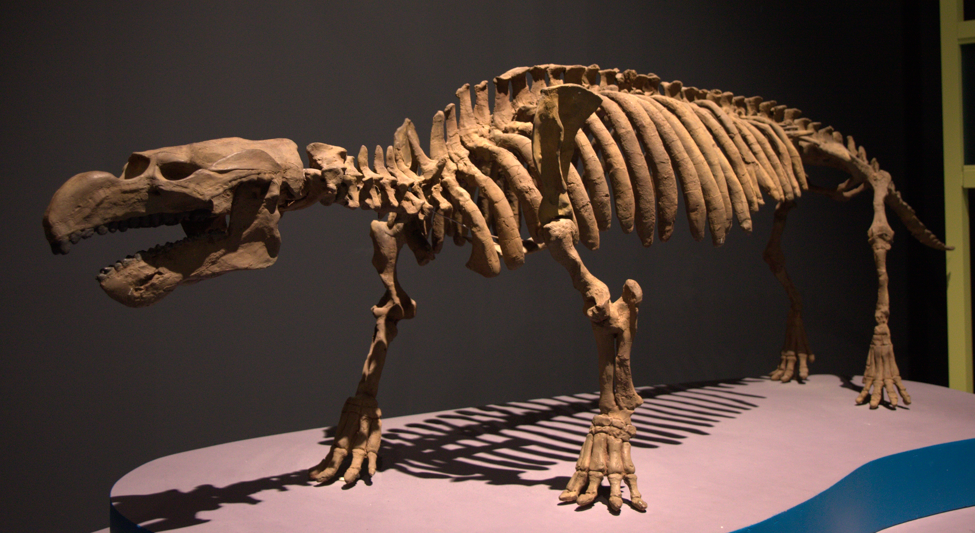 Daté de 50 millions d'années, ce spécimen a été découvert en 2001 en Jamaïque. The making of this document was supported by Wikimédia France. (Submit your project!)